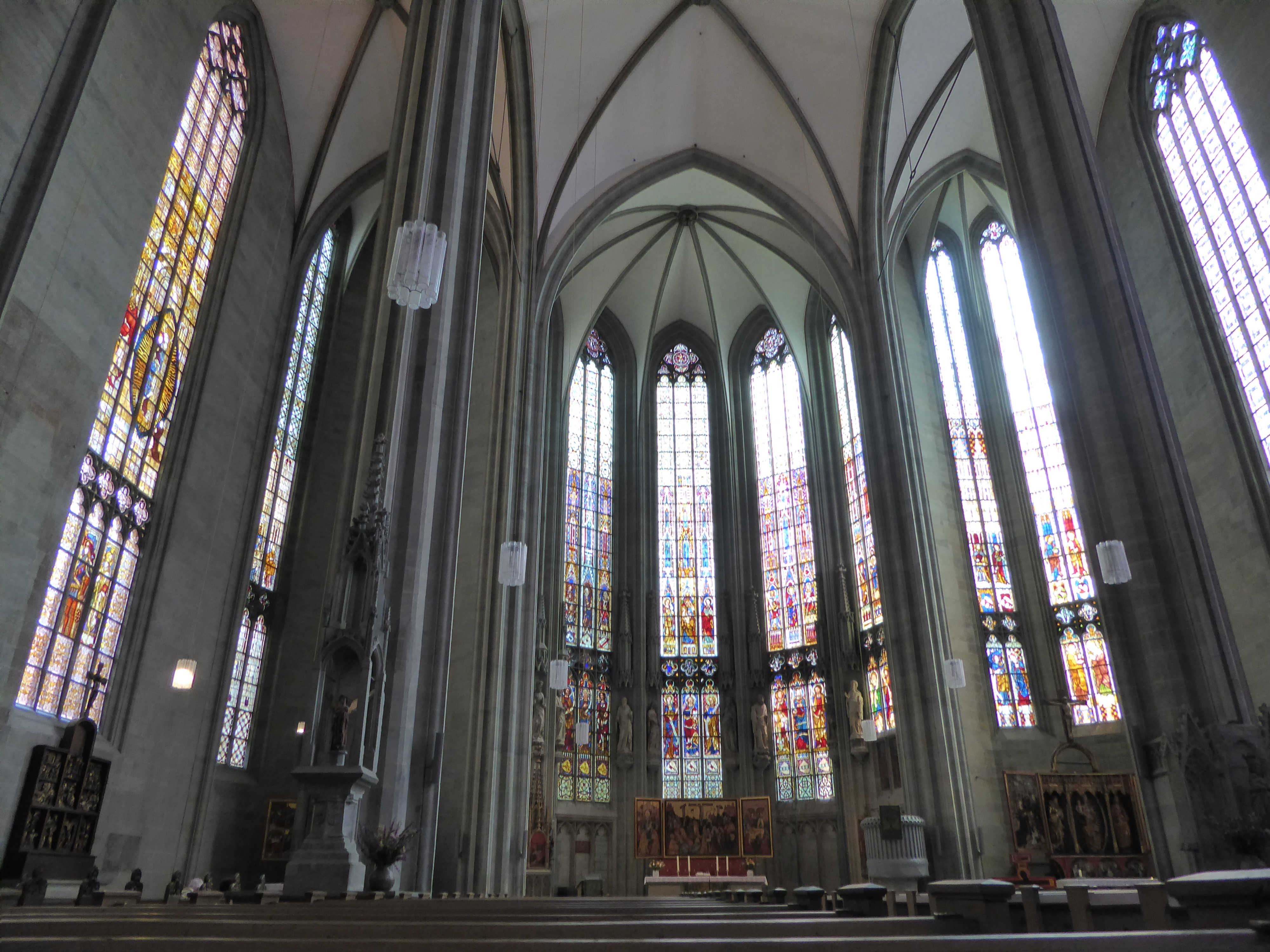 Soest, Wiesenkirche